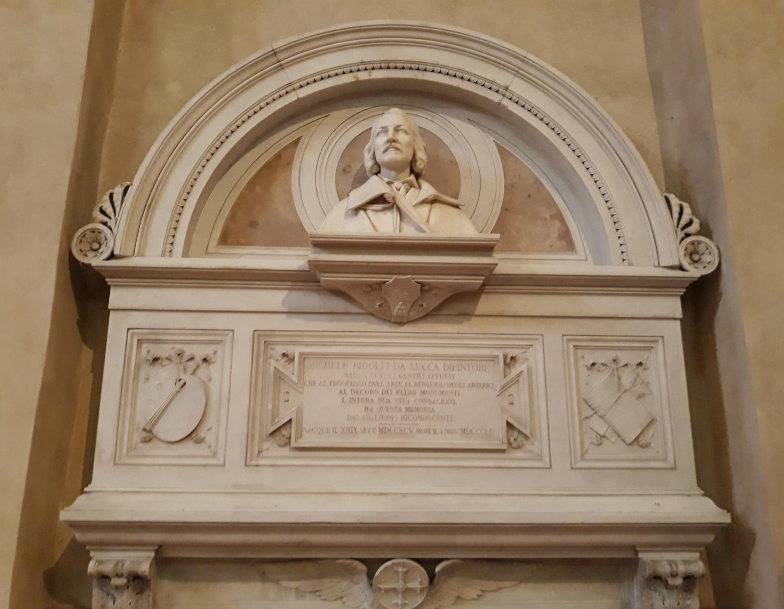 Monumento funebre in ricordo del pittore Michele Ridolfi nella chiesa dei santi Giovanni e Reparata a Lucca